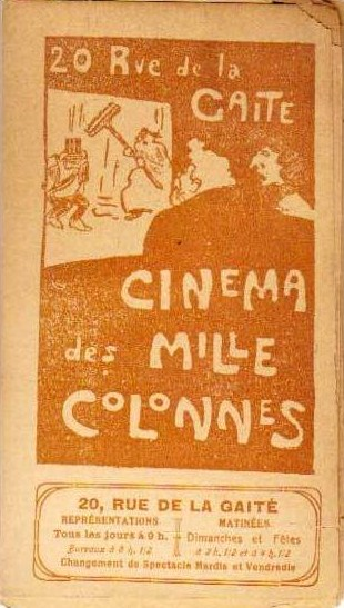 Publicité imprimée pour le cinéma des Mille Colonnes rue de la Gaîté à Paris